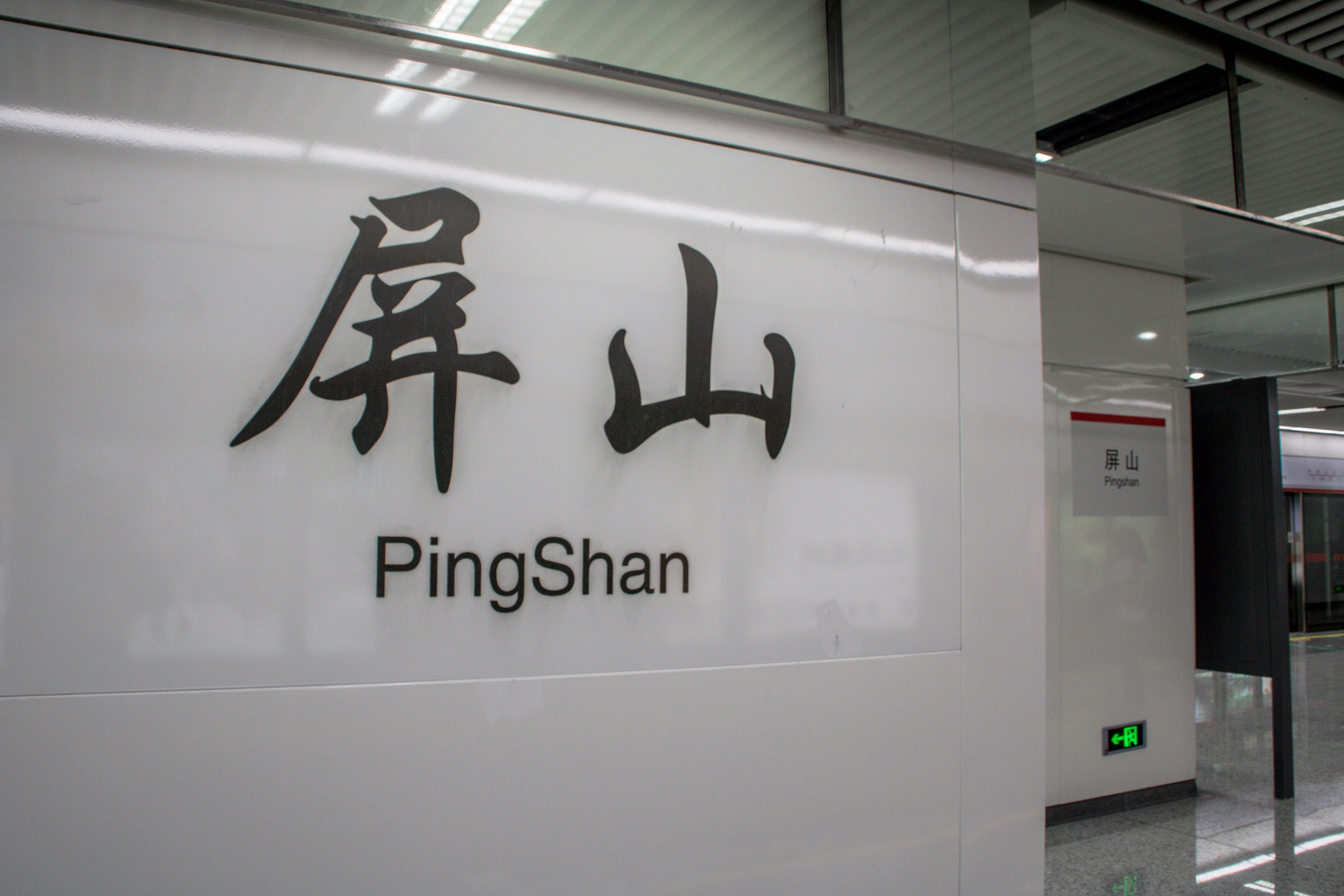 屏山站大字壁